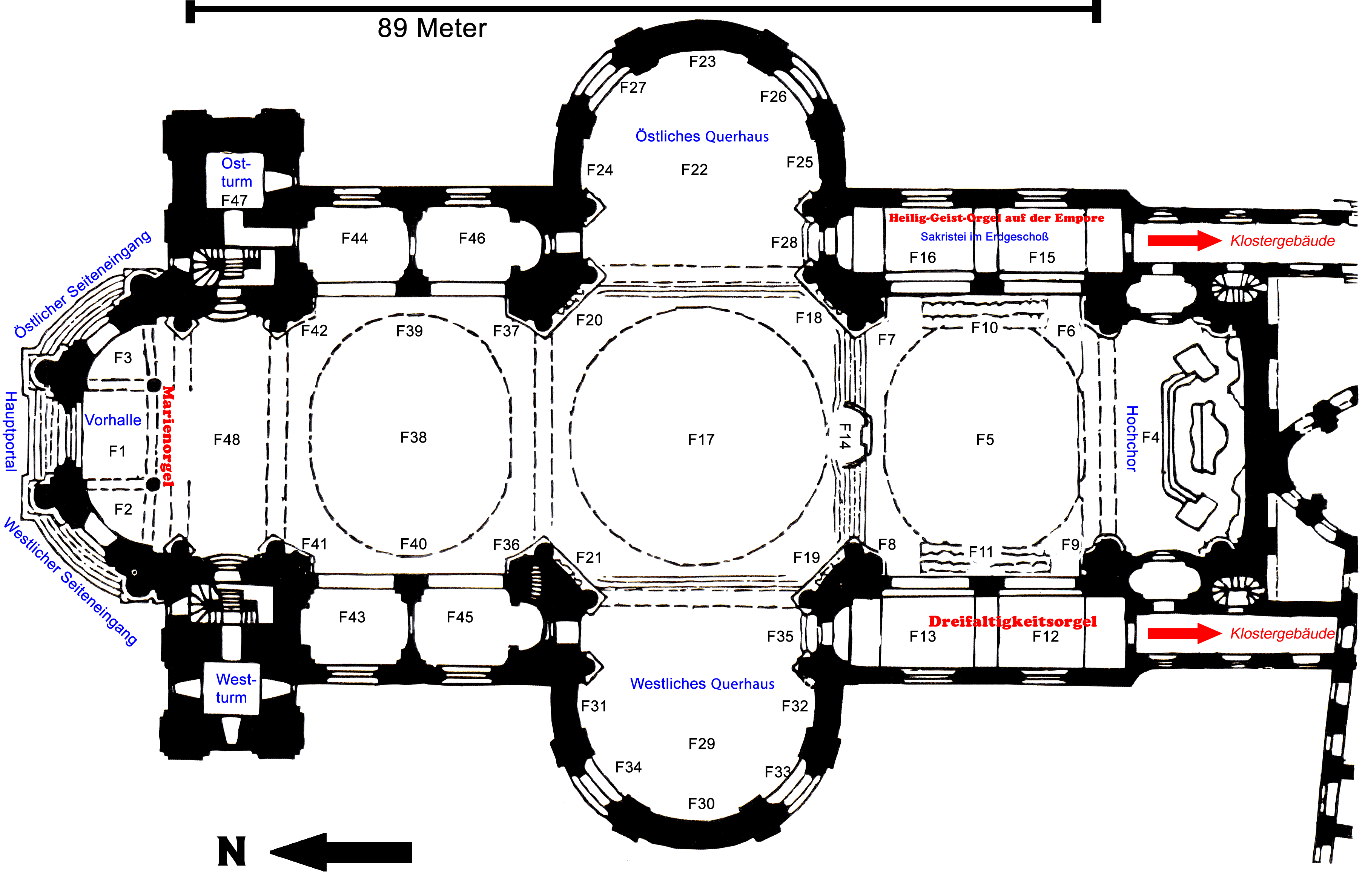 Der Grundriß der Basilika Ottobeuren (Oberschwaben)